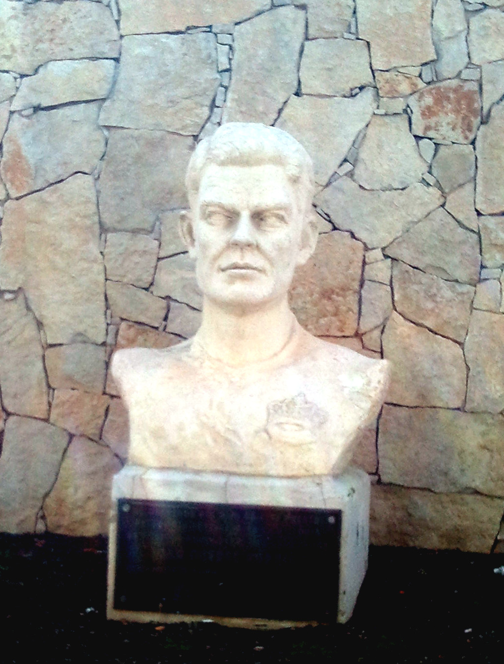 Busto de Juan Guedes sito en Carrizal